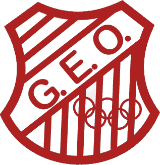 Logo: Grêmio Esportivo Olímpico - Blumenau (SC), Brazil.